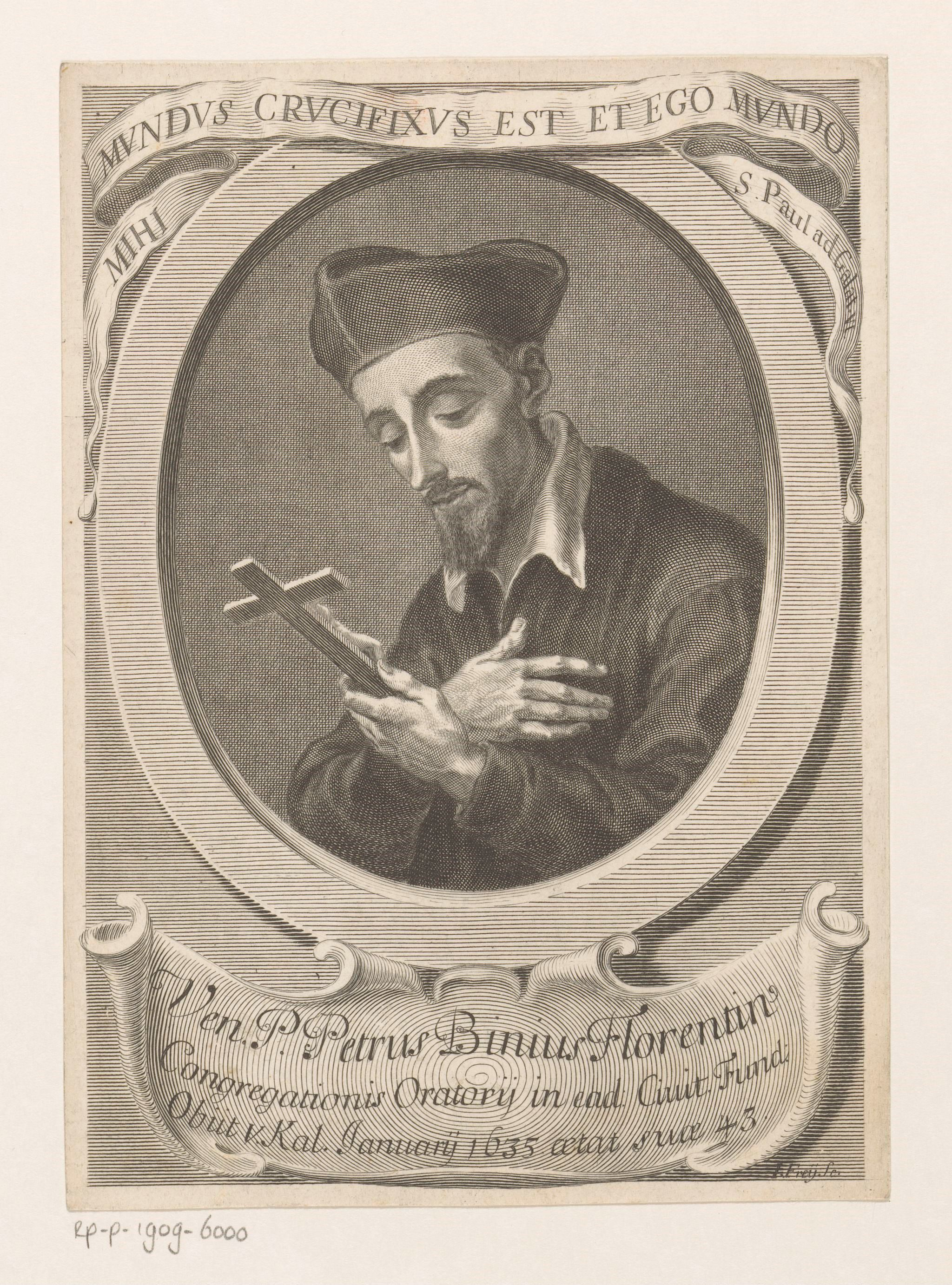 IdentificatieTitel(s): Portret van Pietro Bini op 43-jarige leeftijdObjecttype: prent Objectnummer: RP-P-1909-6000Opschriften / Merken: verzamelaarsmerk, verso, gestempeld: Lugt 2228verzamelaarsmerk, verso, gestempeld: Lugt 2507Omschrijving: Met onderschrift in het Latijn.VervaardigingVervaardiger: prentmaker: Jacob Frey (der Ältere) (vermeld op object)Datering: 1691 - 1752Materiaal: papier Techniek: graveren (drukprocedé)Afmetingen: blad: h 195 mm (binnen plaatrand afgesneden) × b 140 mm (binnen plaatrand afgesneden)OnderwerpWat: historical personsmeditation over skull and/or crucifixornament ~ cartoucheWie: Pietro BiniVerwerving en rechtenVerwerving: aankoop 1905Copyright: Publiek domein